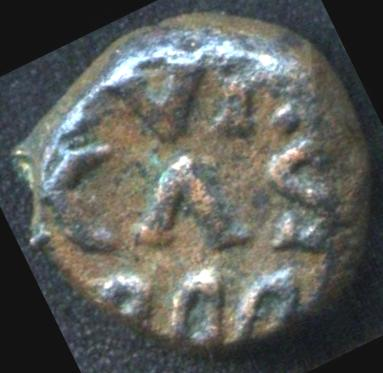 INDIA_DANSH_TRANKEBAR_FOUR_KAS_AD_1800_C_VII_ERROR_XR